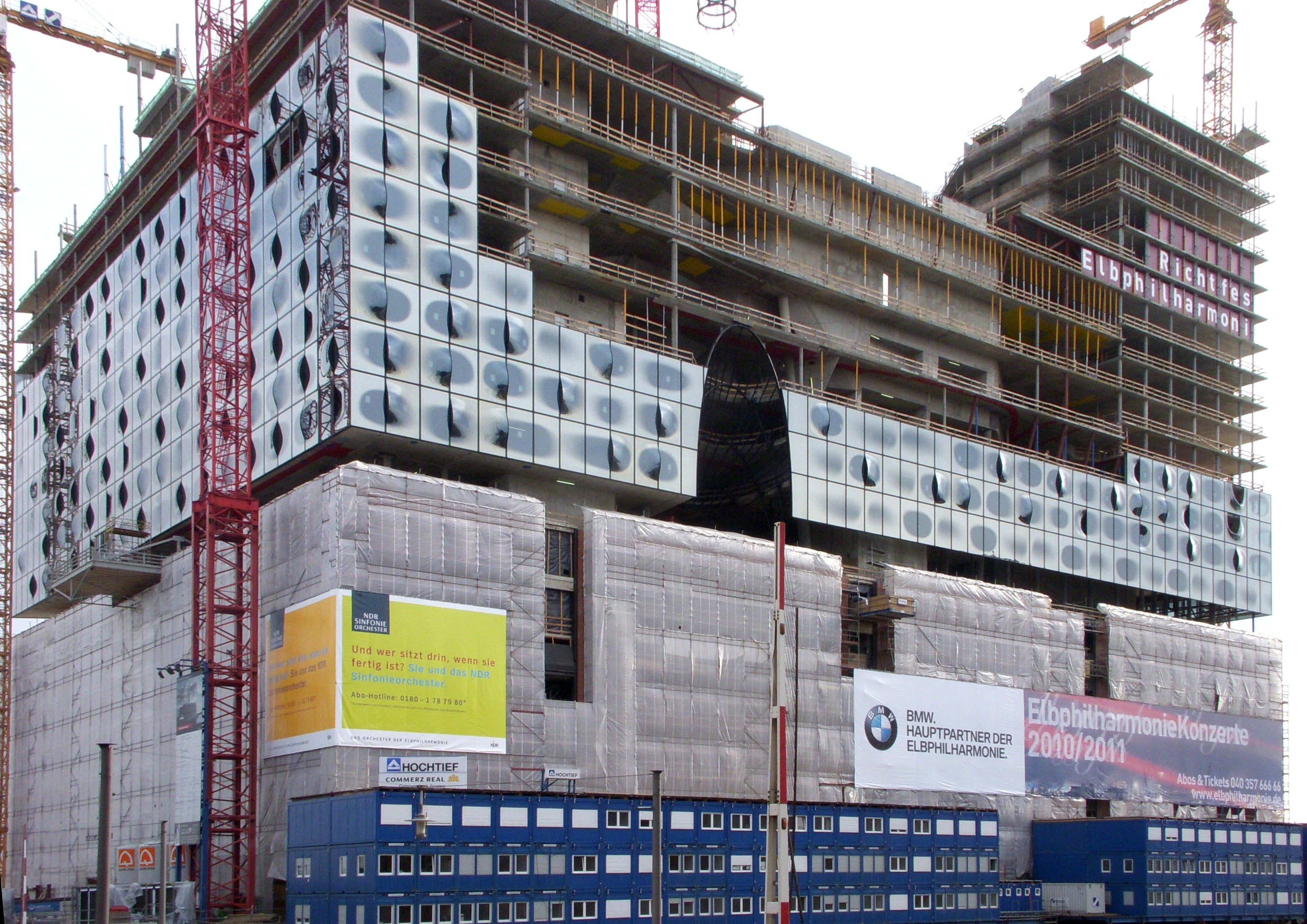 Elbphilharmonie mit Richtfestkranz